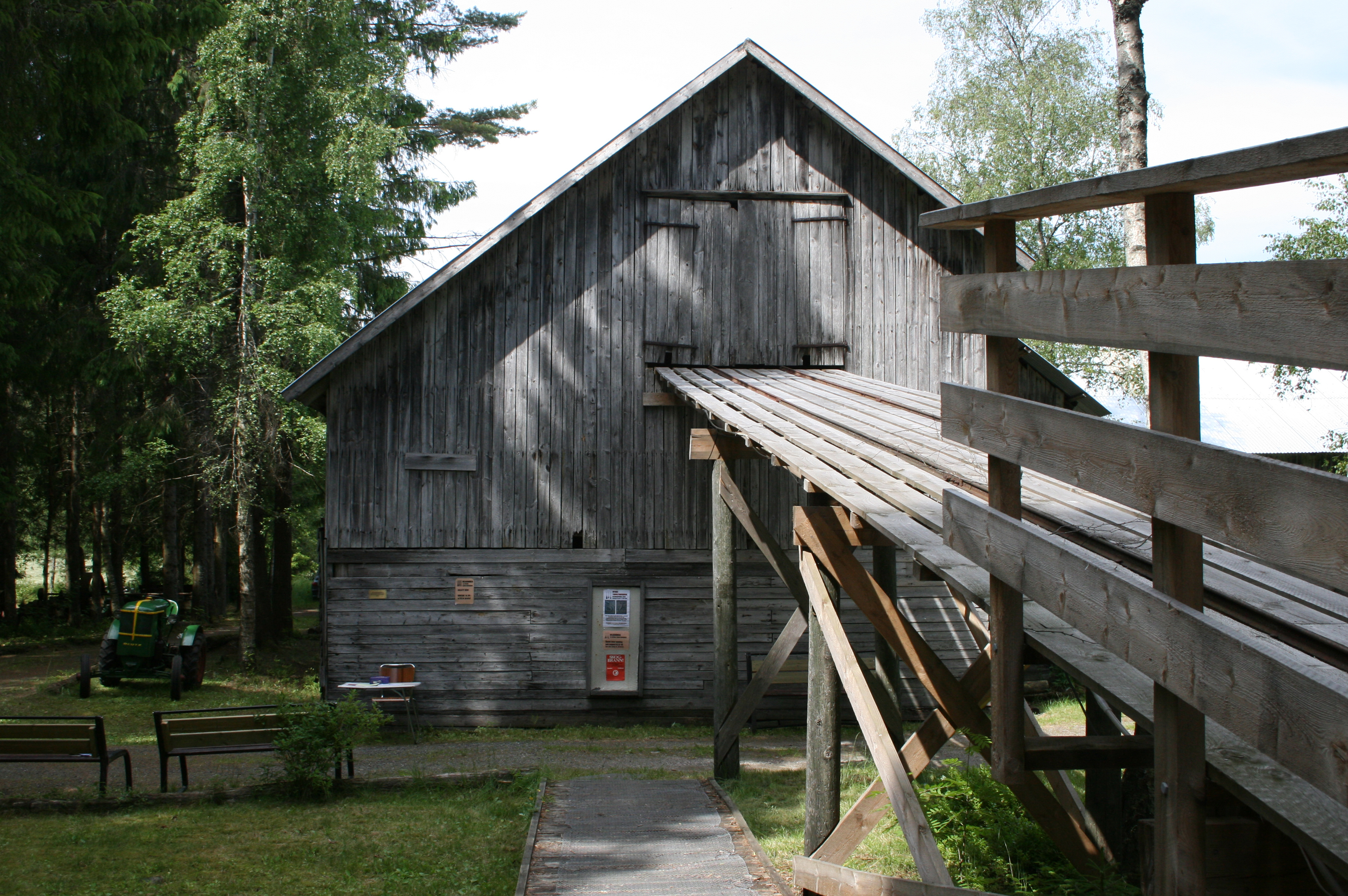 Torvstrømuseet i Birkenes